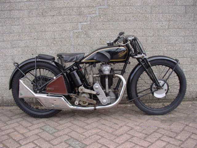 Toestemming van Yesterdays Antique Motorcycles